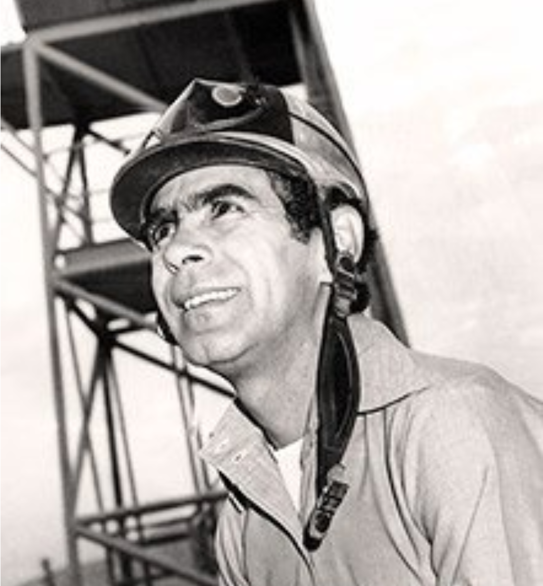 Gustavo Avila